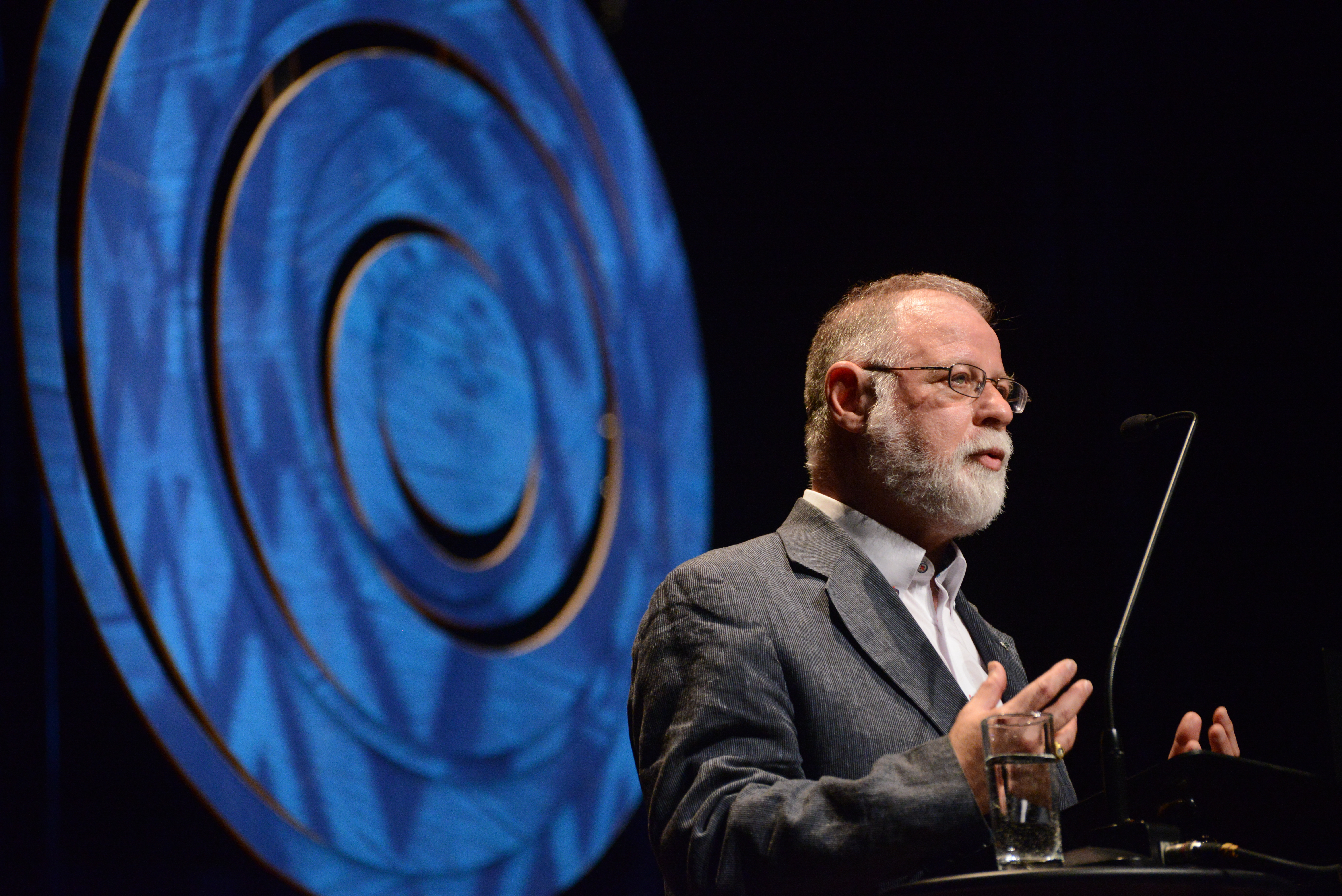 Conferencista: Alberto Manguel, escritor argentino Data: 03 de novembro de 2014 Local: Salão de Atos da UFRGS - Porto Alegre/RS Crédito: Luiz Munhoz